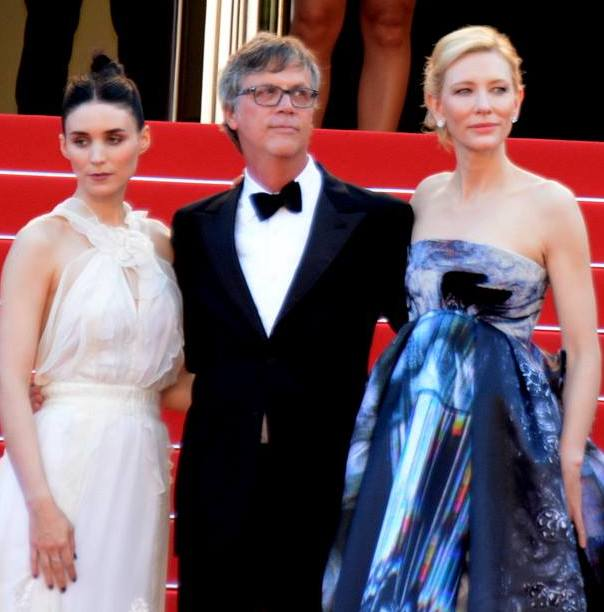 Rooney Mara, Todd Haynes et Cate Blanchett lors de la présentation de "Carol" au festival de Cannes